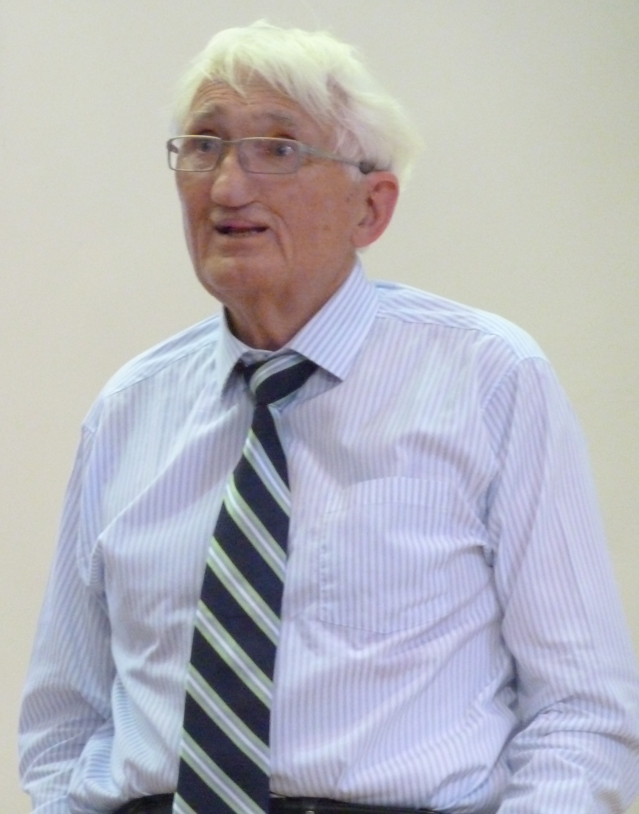 Jürgen Habermas spricht zur Krise der Europäischen Union Vortrag des Philosophen am 16. Juni im Audimax der Humboldt-Universität zu Berlin